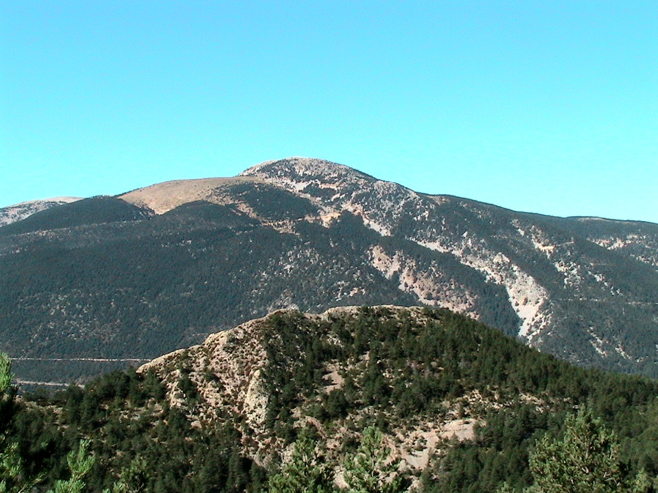 El Roc del Migdia de la Colilla, en primer terme, es retalla sobre les estribacions de l'Estivella. La Coma i la Pedra (Solsonès - Catalunya)